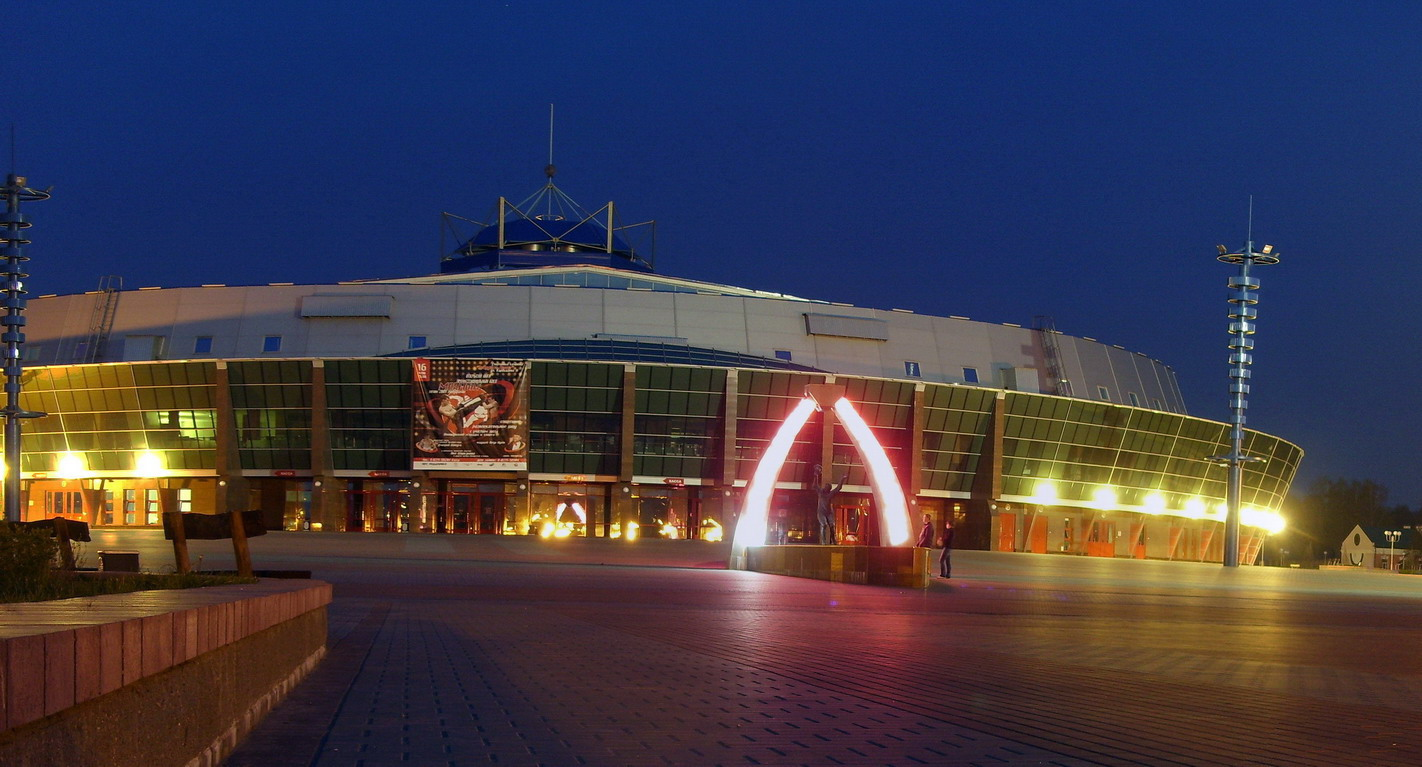 Ледовый дворец, г.Бобруйск, Беларусь